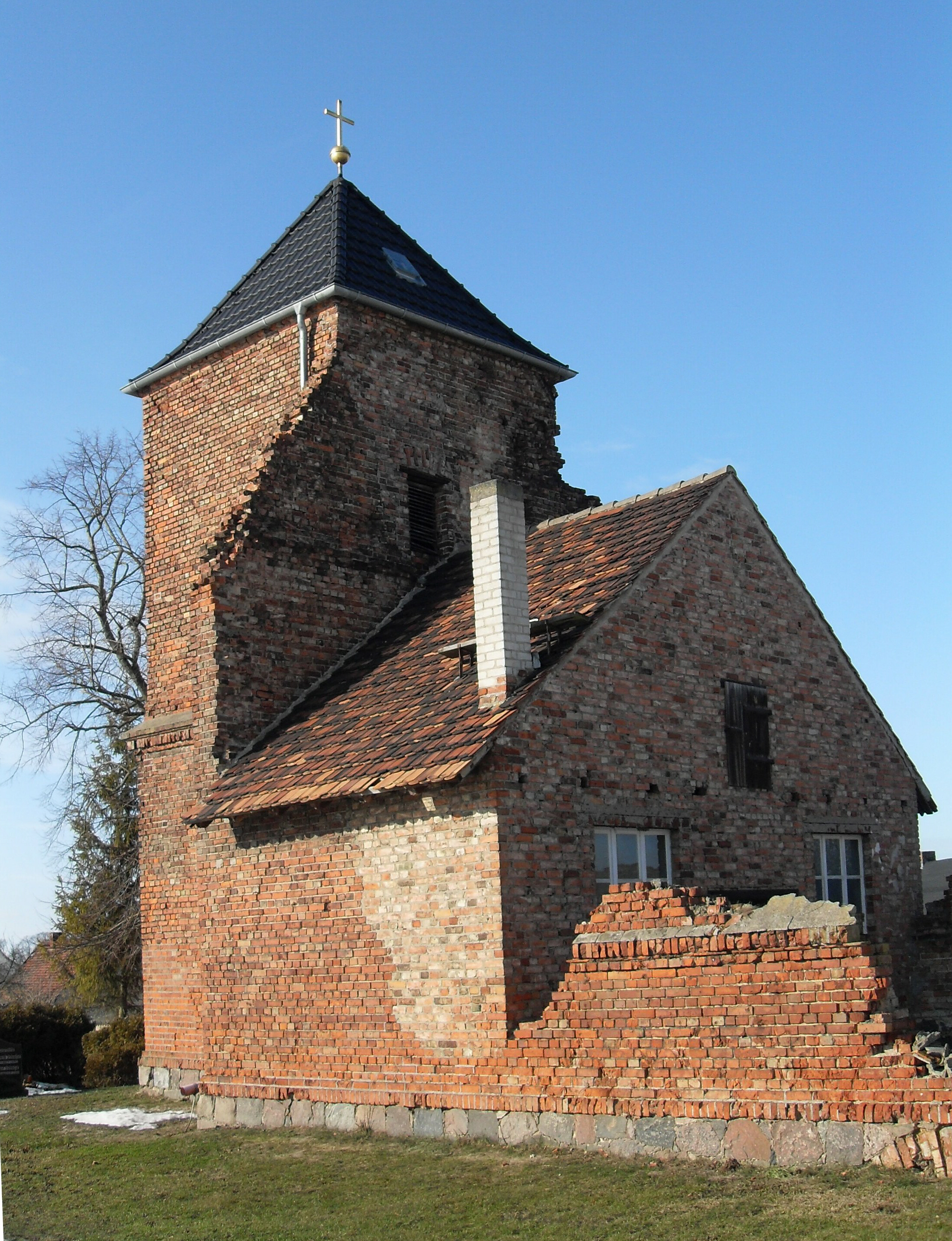 Kirche in Carzig, Gemeinde Fichtenhöhe, Deutschland